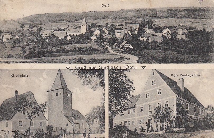 Ansichtskarte Sindlbach: Gruß aus Sindlbach 1917 um 1917